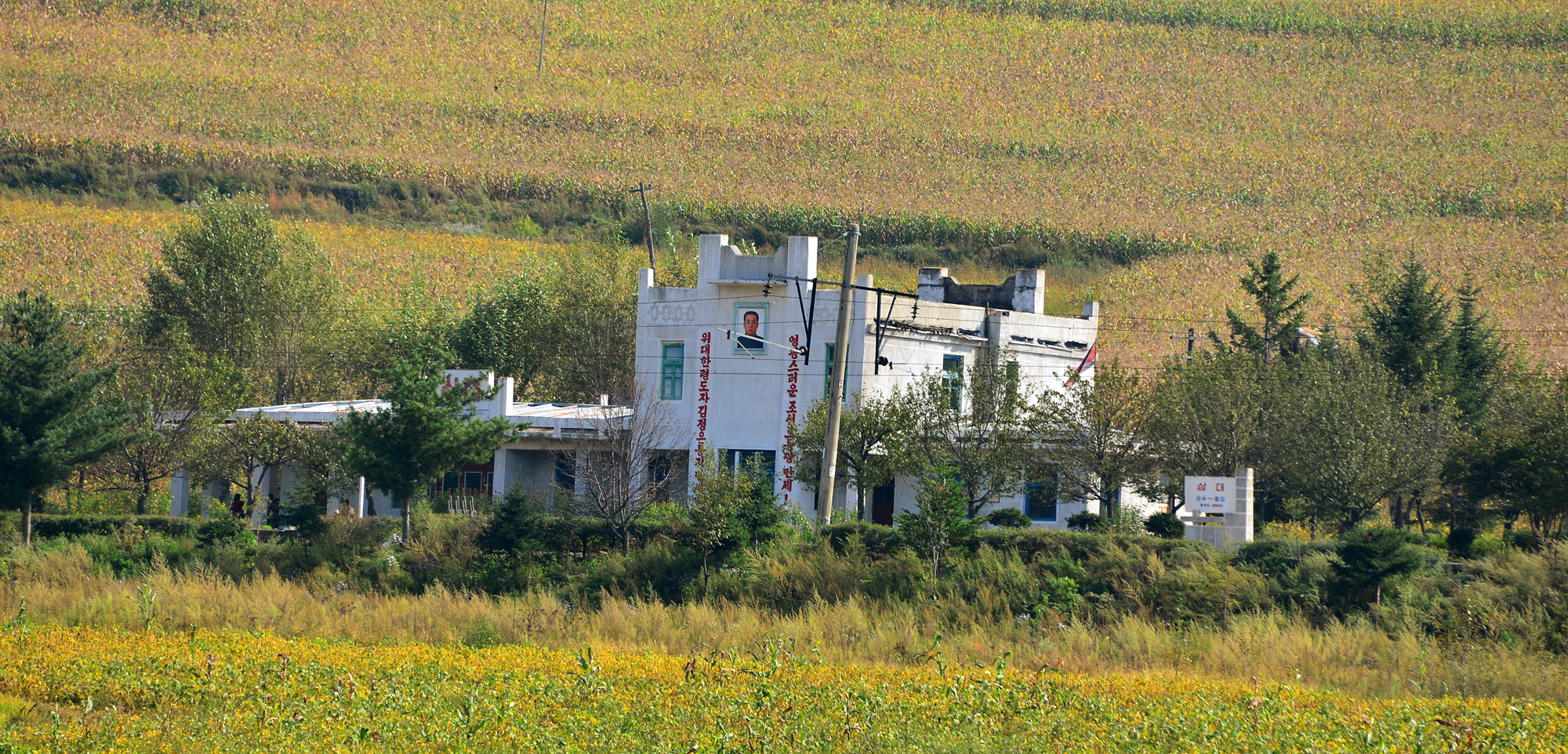 两江道上台站